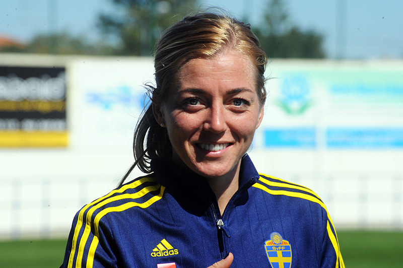 a_67_4691